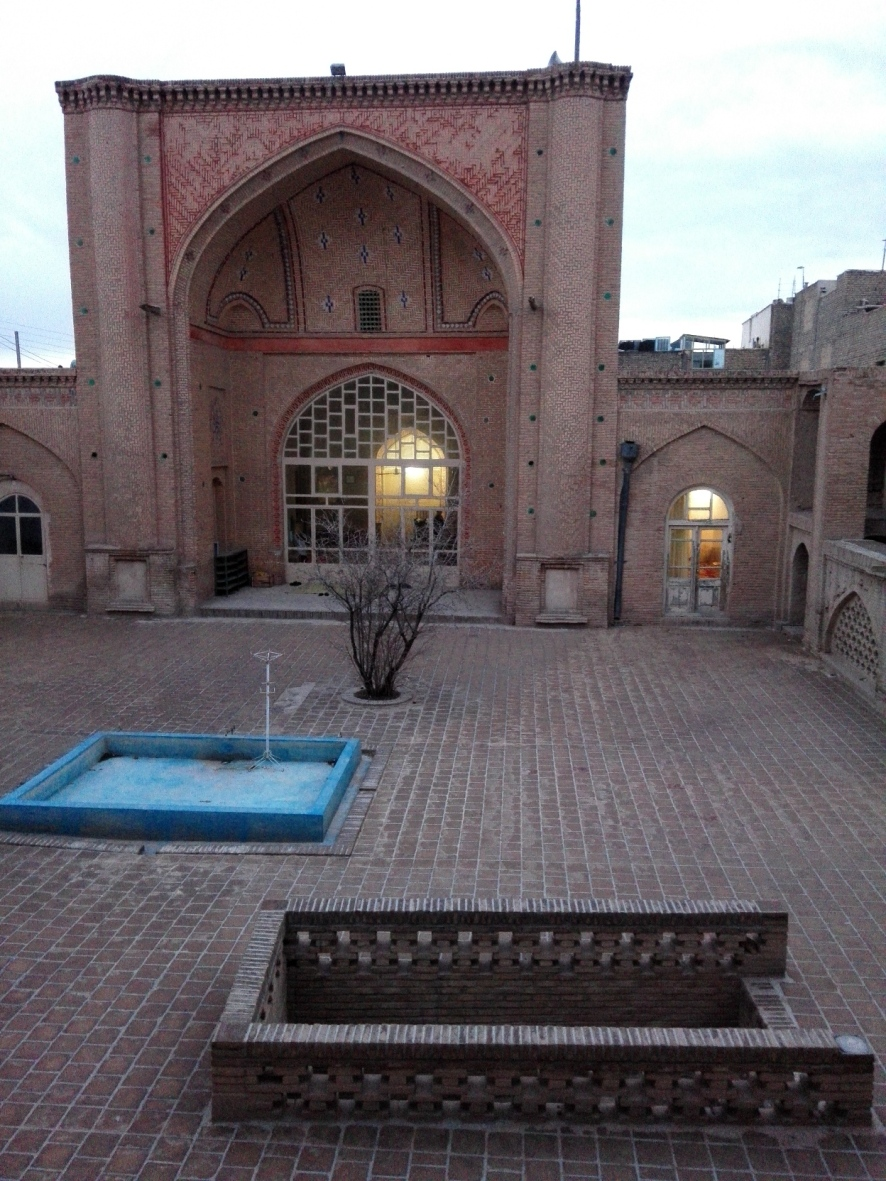 ایران ، شاهرود ، مسجد تاریخی شیخ علی اکبر